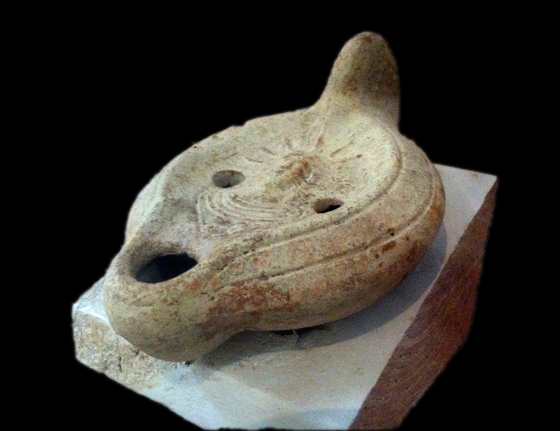 Lampe à huile de la période romaine exposée au musée archéologique de Lamta.